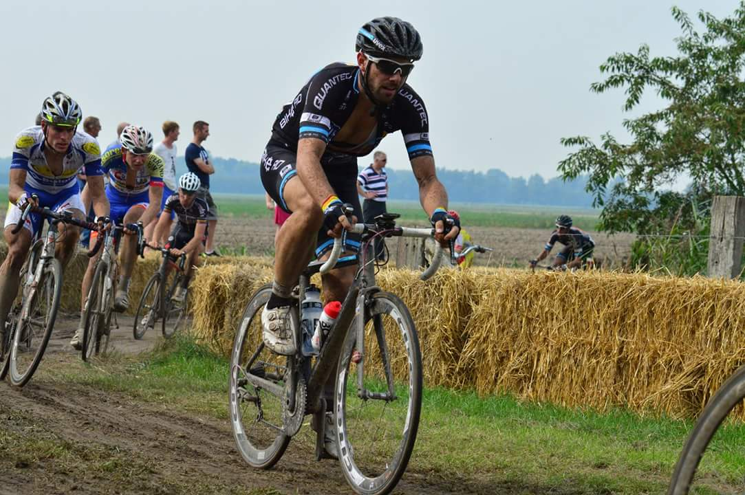 Patrick Lechner beim Rennen Schaal Seels 2015